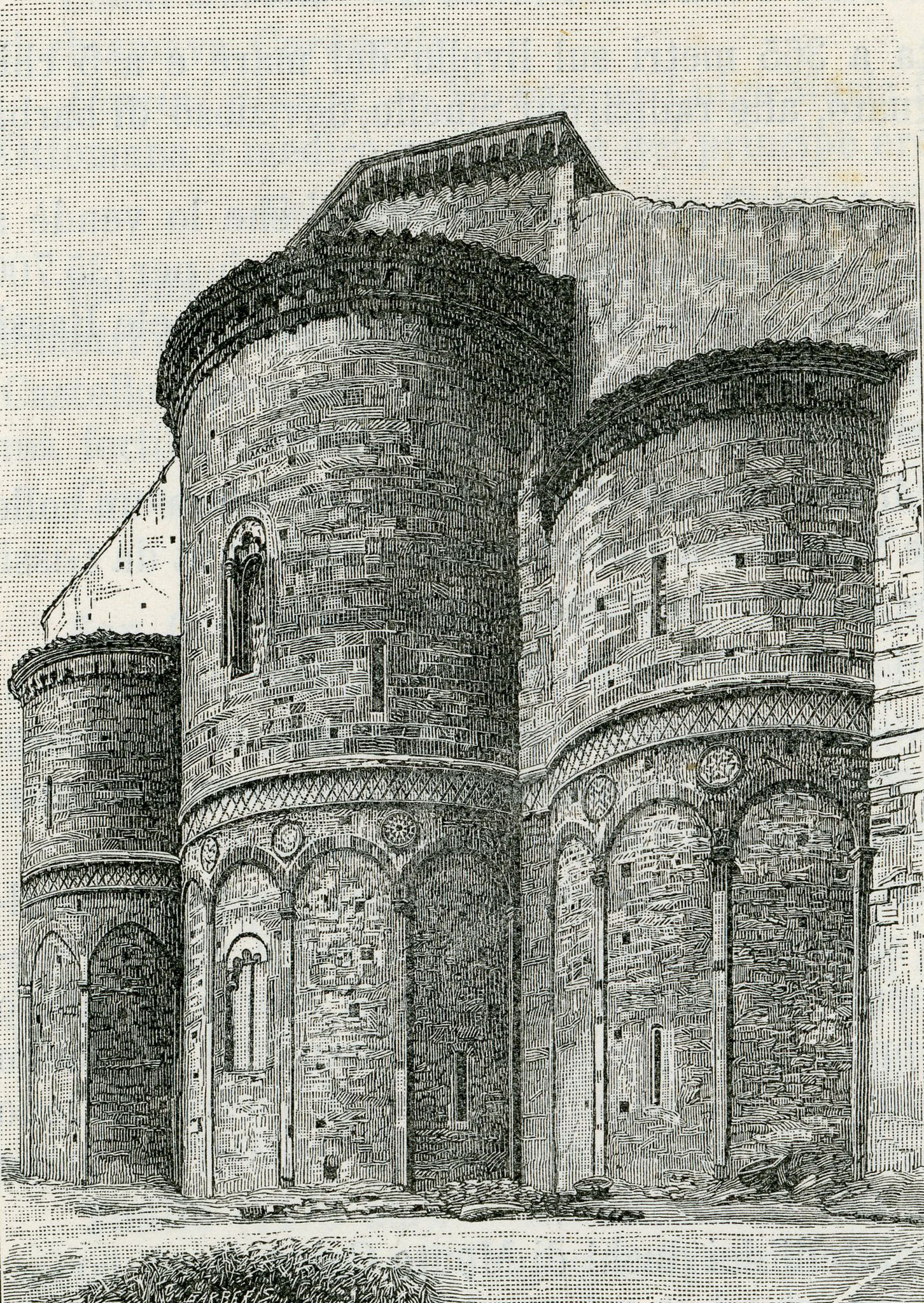 Fossacesia:chiesa di San Giovanni in Venere (xilografia di Barberis 1898).